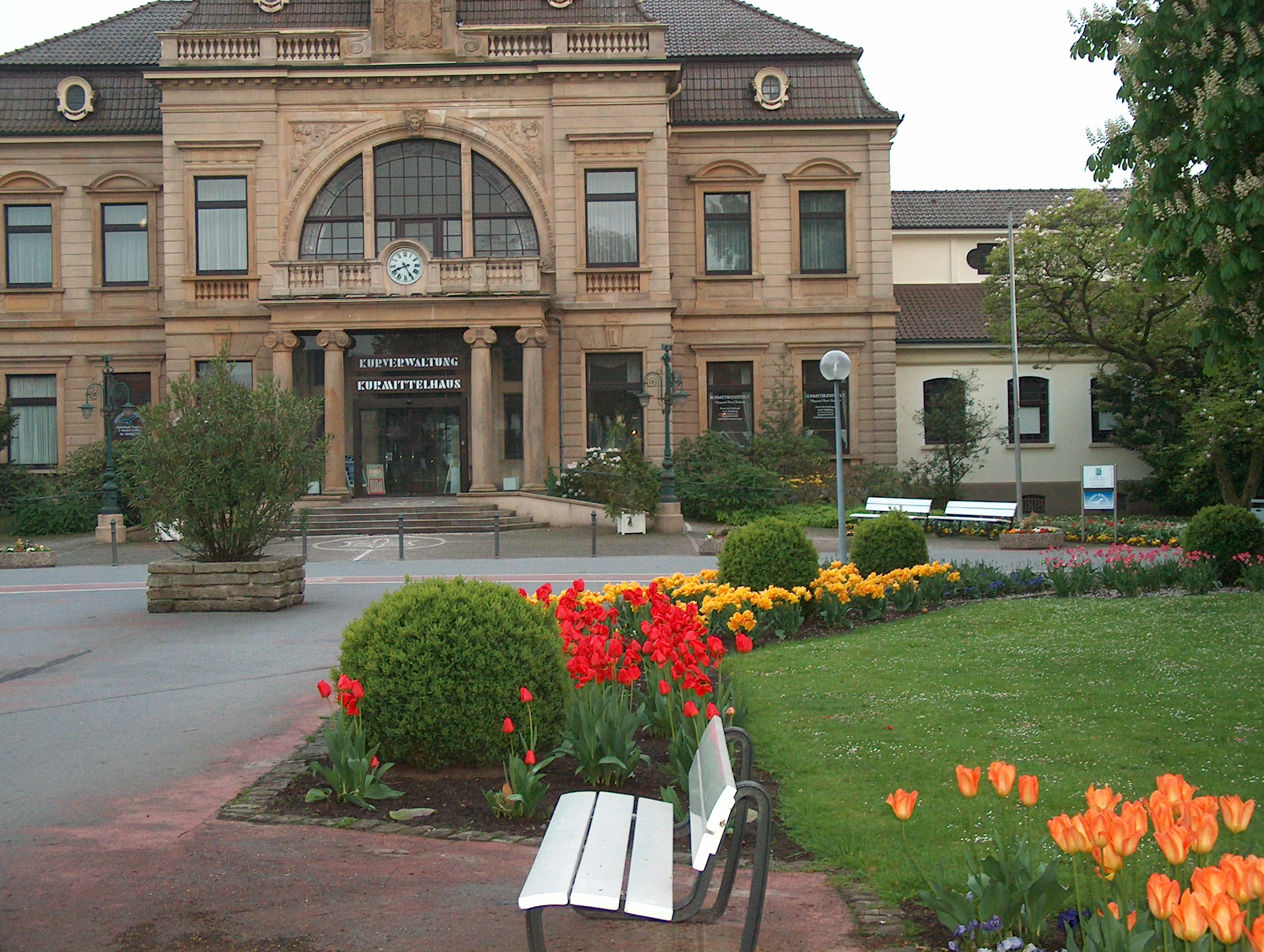 Kurverwaltung und Kurmittelhaus.